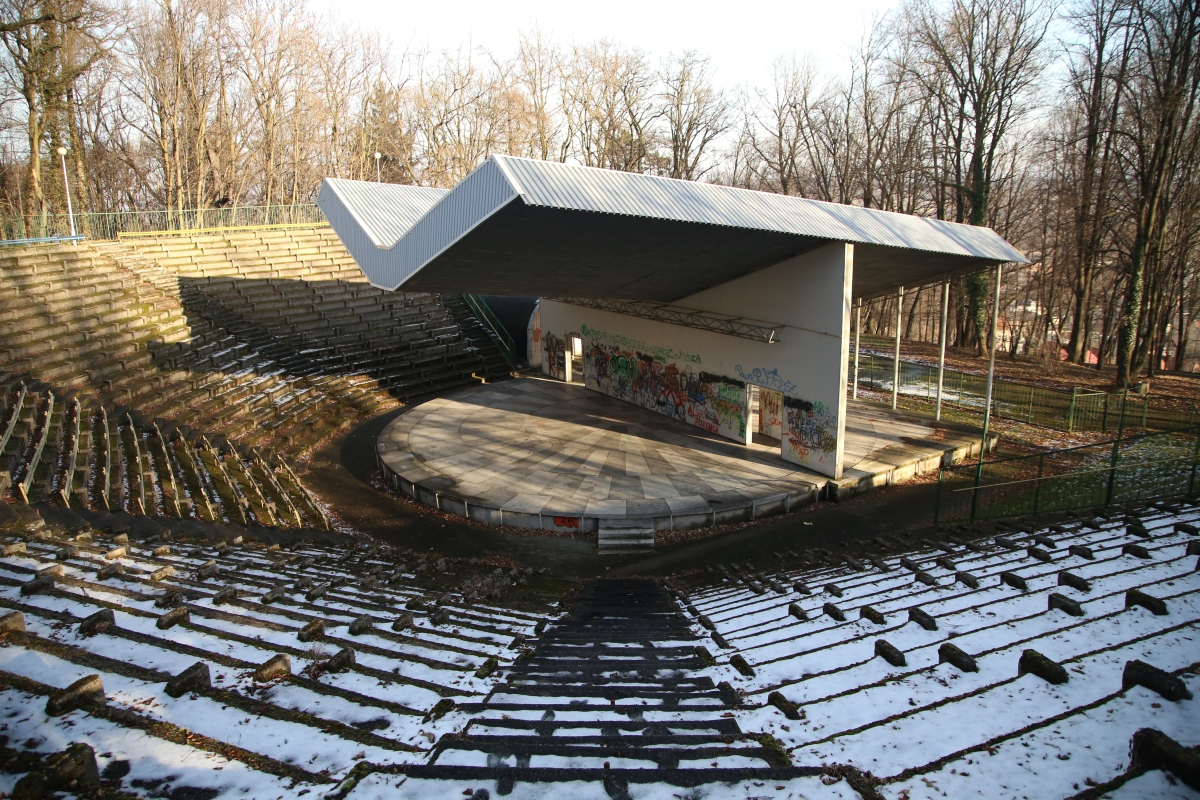 Amfiteatr